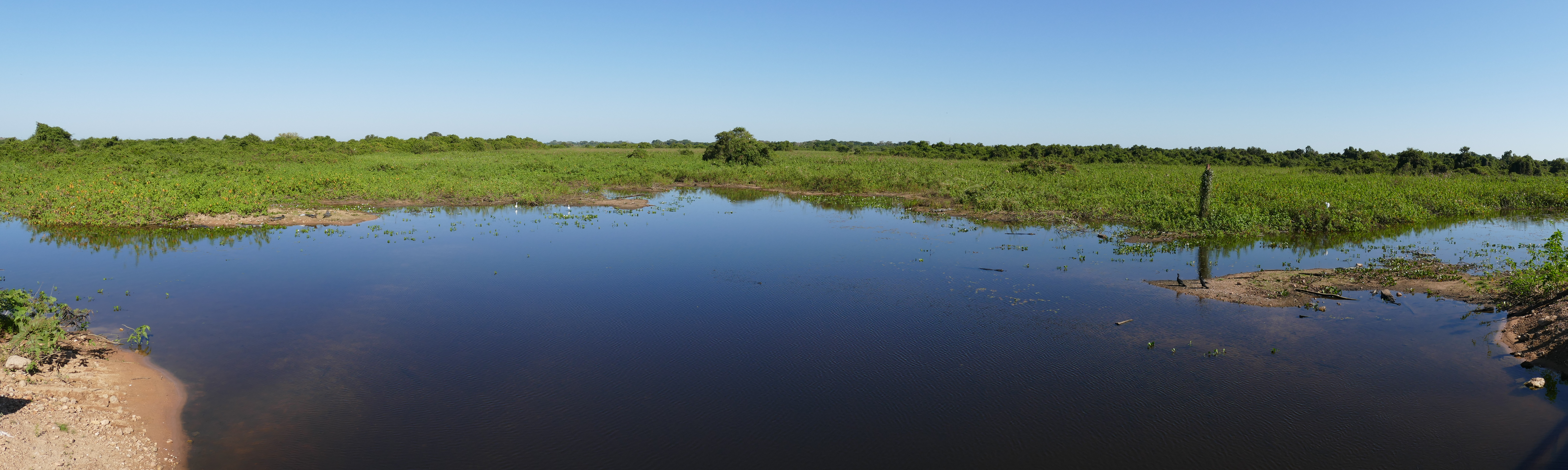 Transpantaneira, Poconé, Mato Grosso, BRAZIL